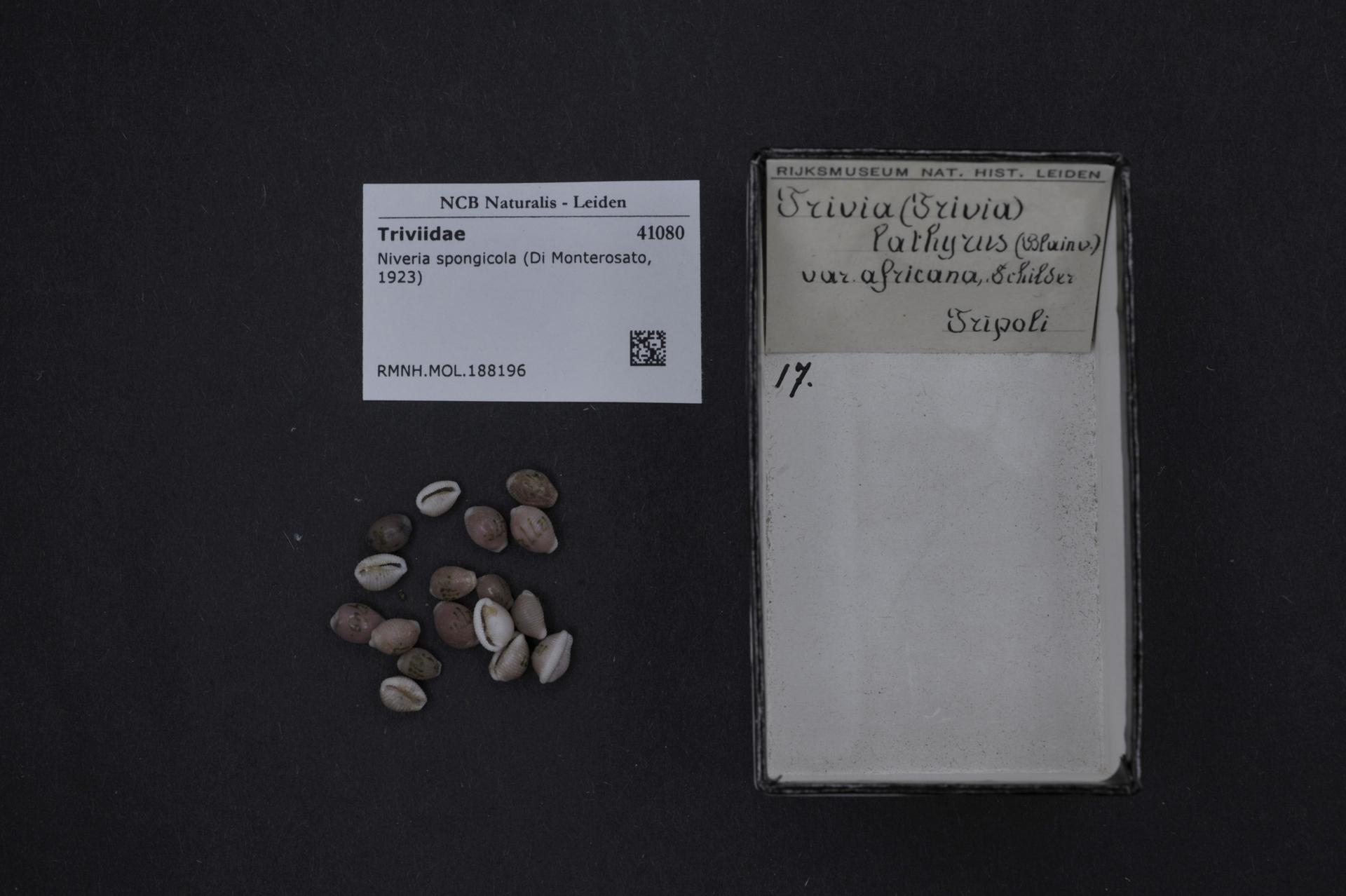 Niveria spongicola (Di Monterosato, 1923)